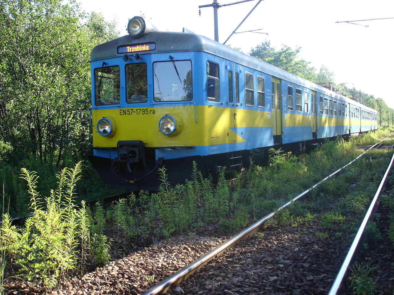 EN57-1795 do Trzebinii jedzie przez las koło Chrzanowa.